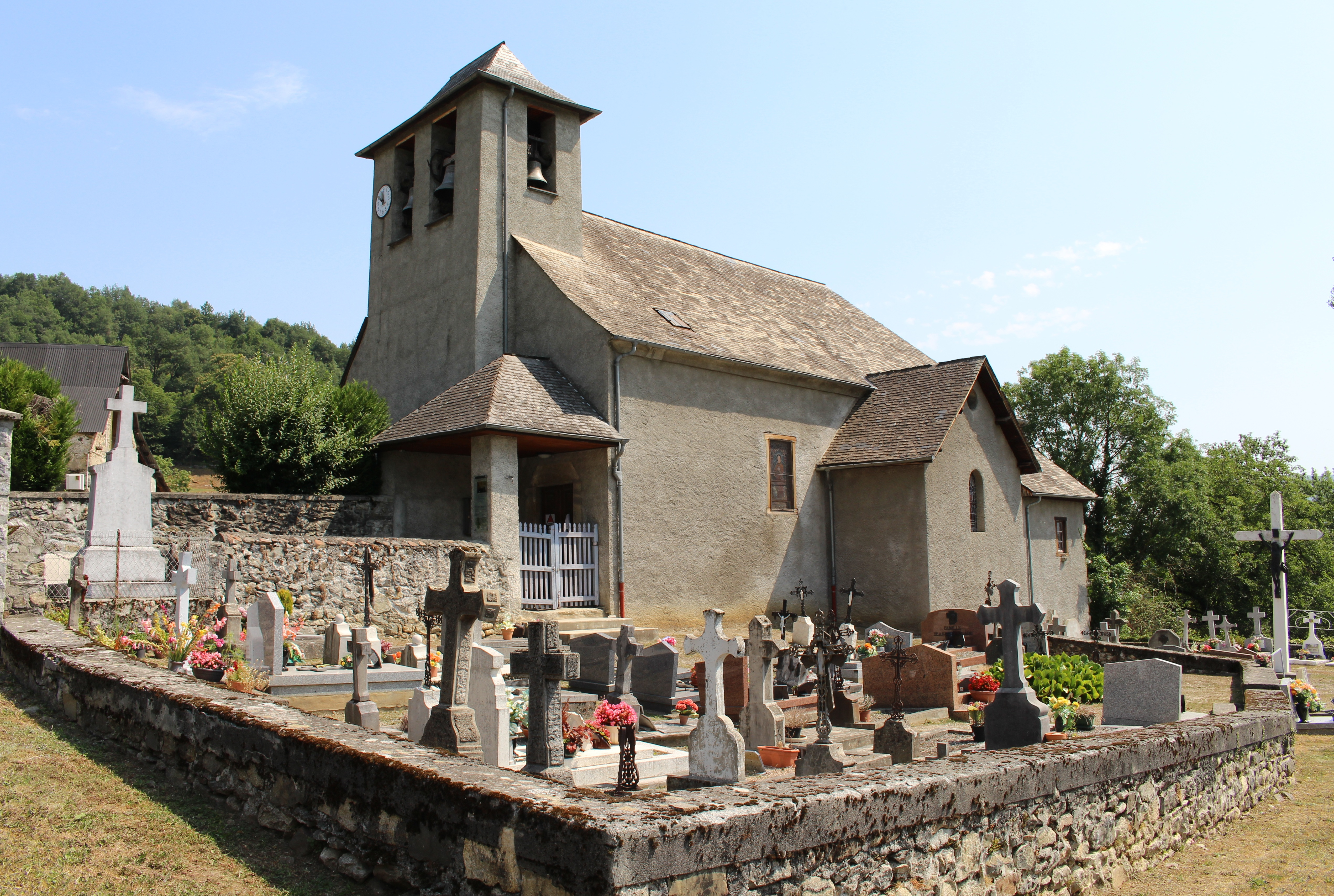 Église Saint-Germé de Gez (Hautes-Pyrénées)